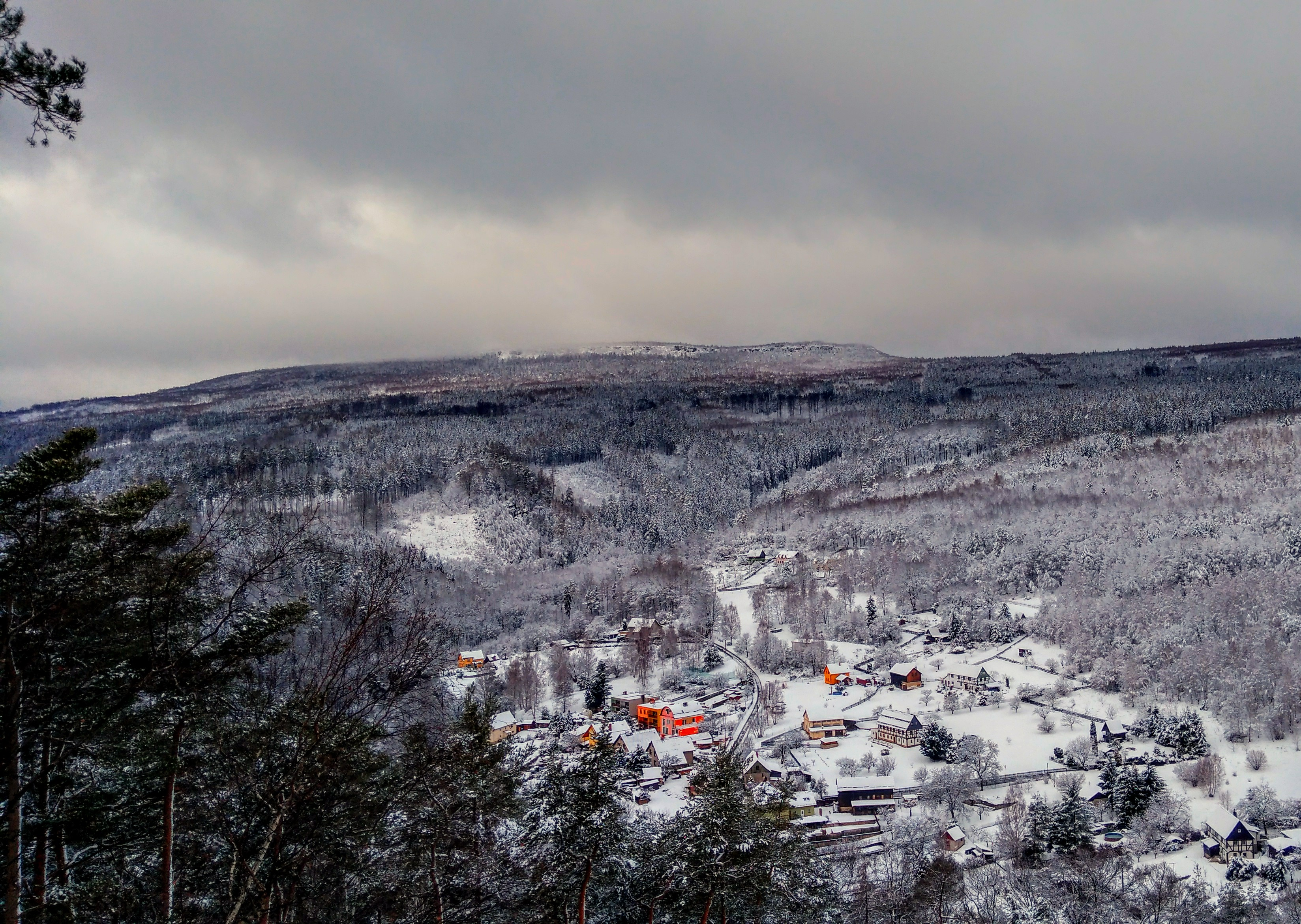 Hora a obec.